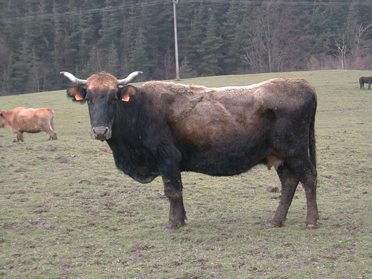 Behi terreña ezaugarri tipikoekin